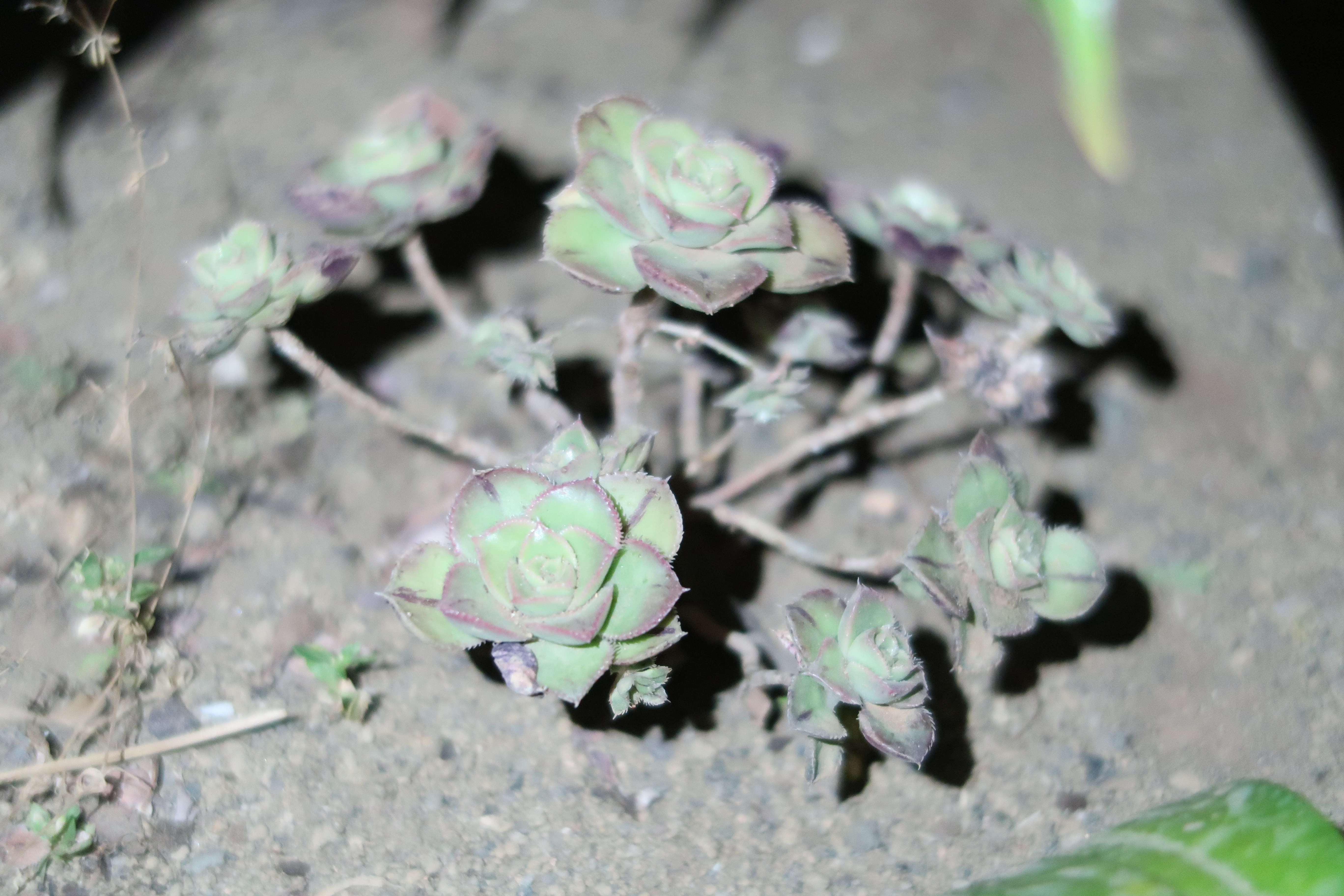 Planta en régimen de cultivo